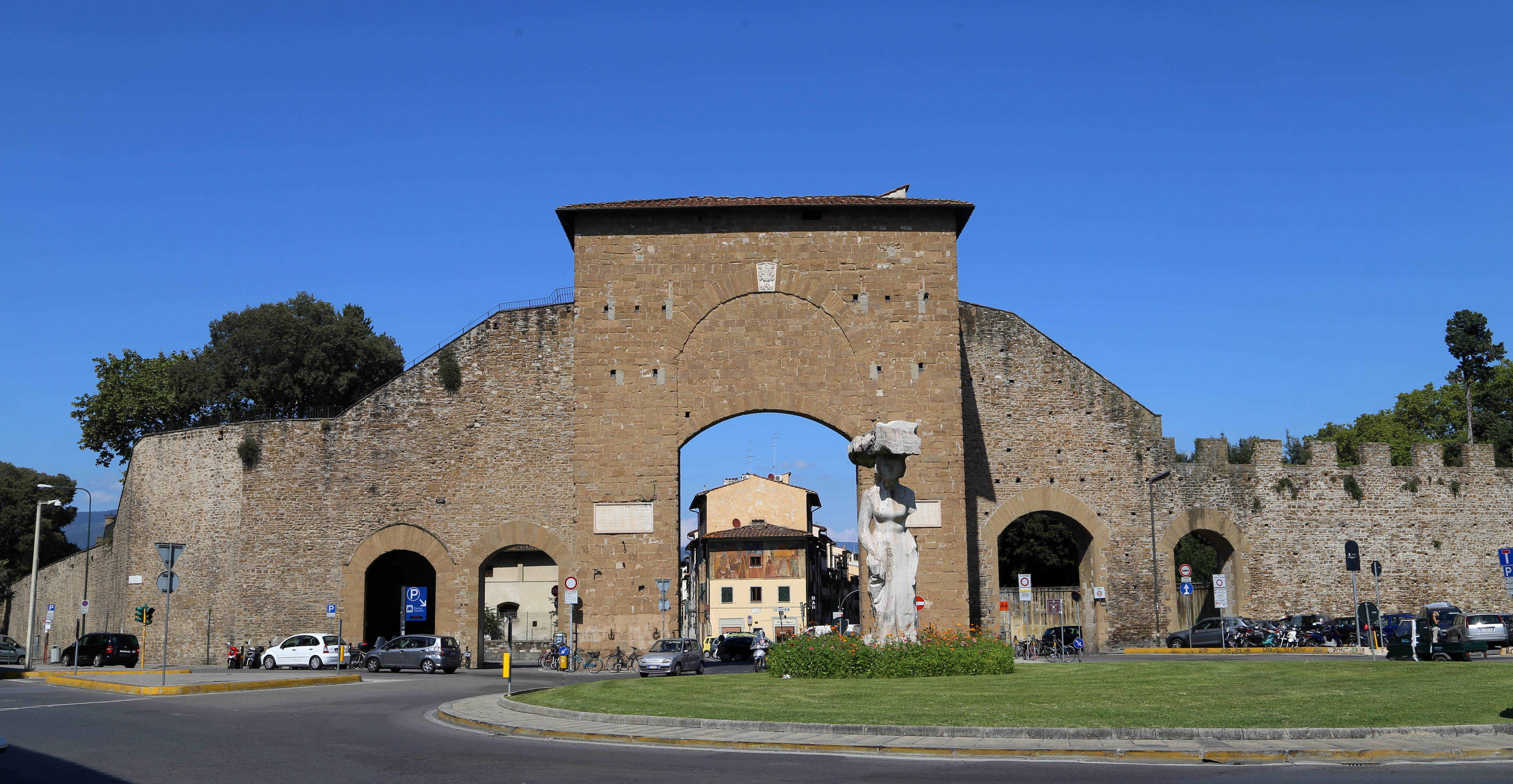 Porta Romana, Florenz